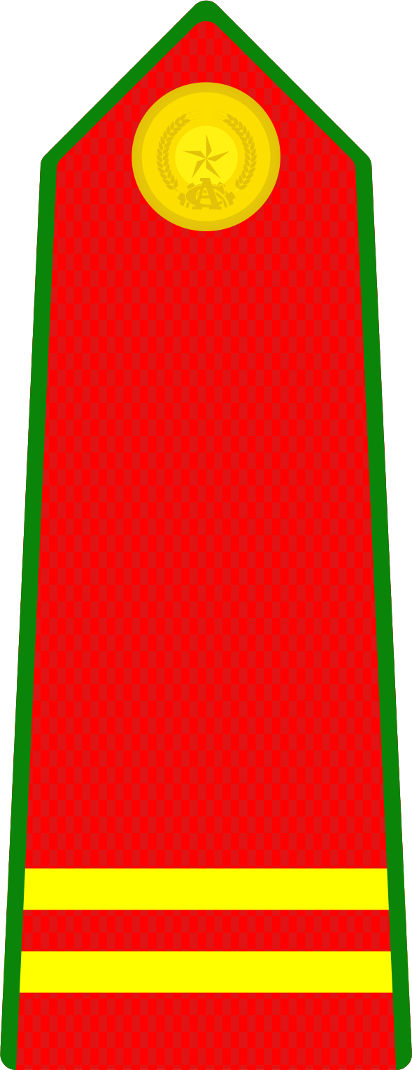 Cấp hiệu Trung sĩ Công an